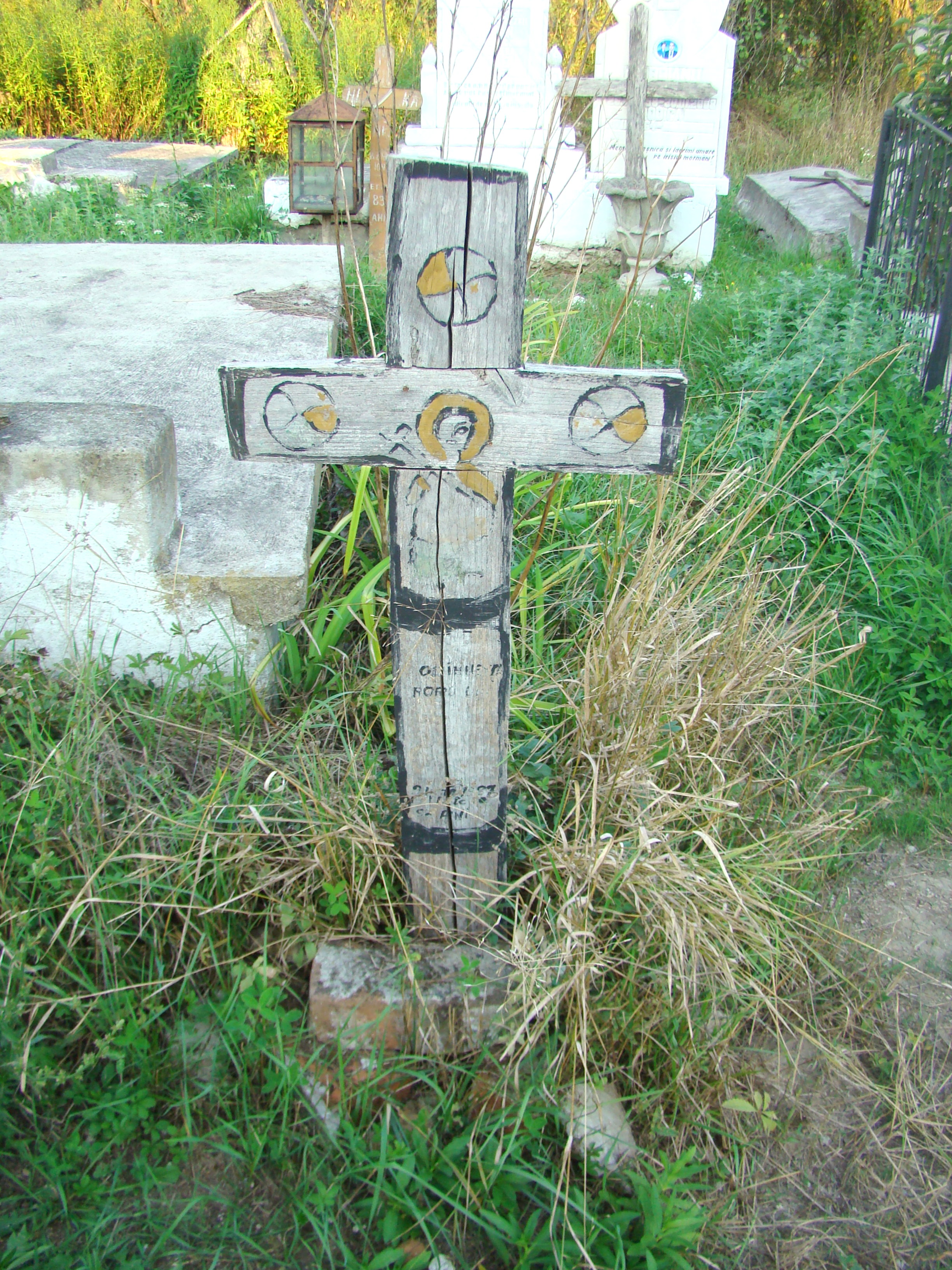 Biserica de lemn „Sf. Nicolae” din Ștefănești